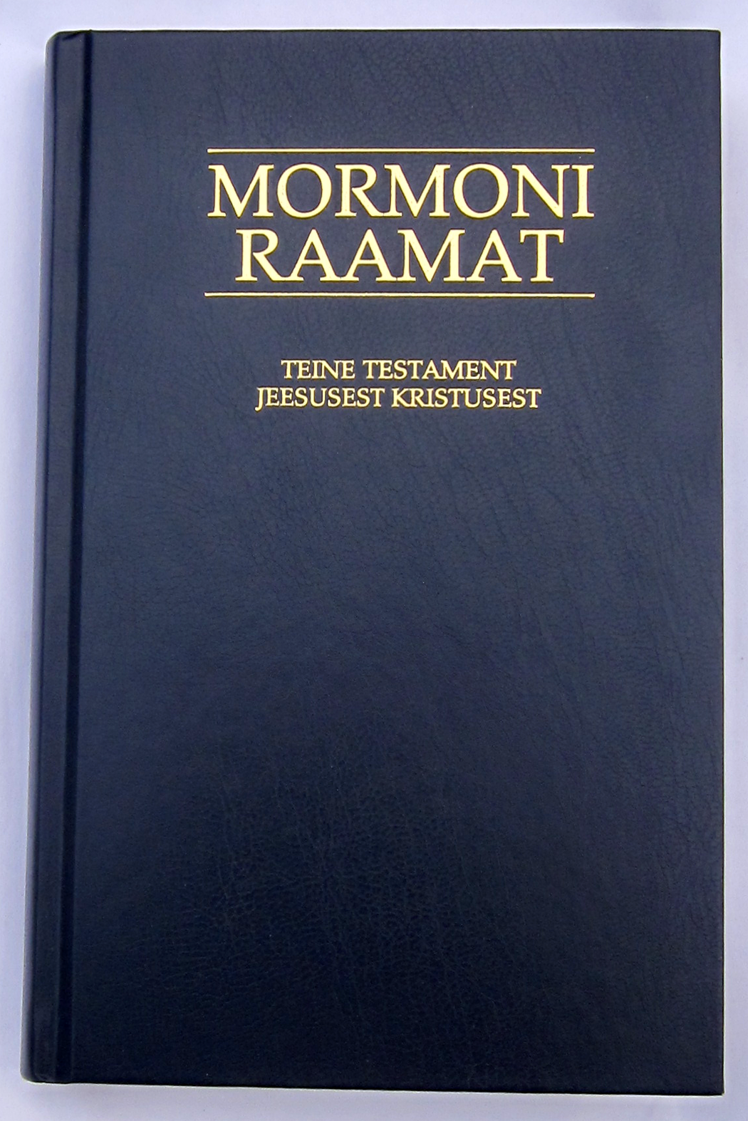 Mormoni raamat